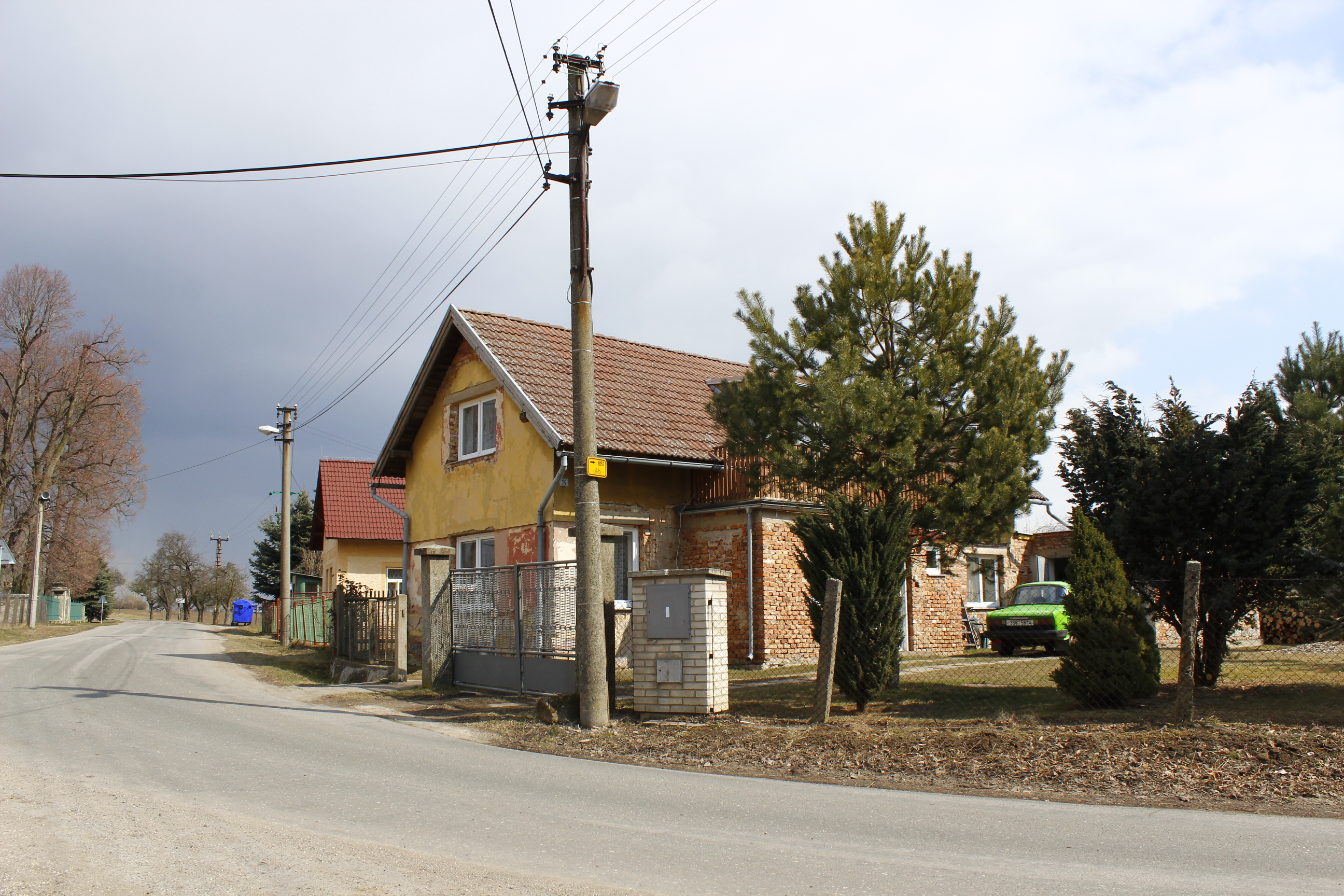 Dům číslo popisné 14 v Malých Horkách, části Rokytovce.